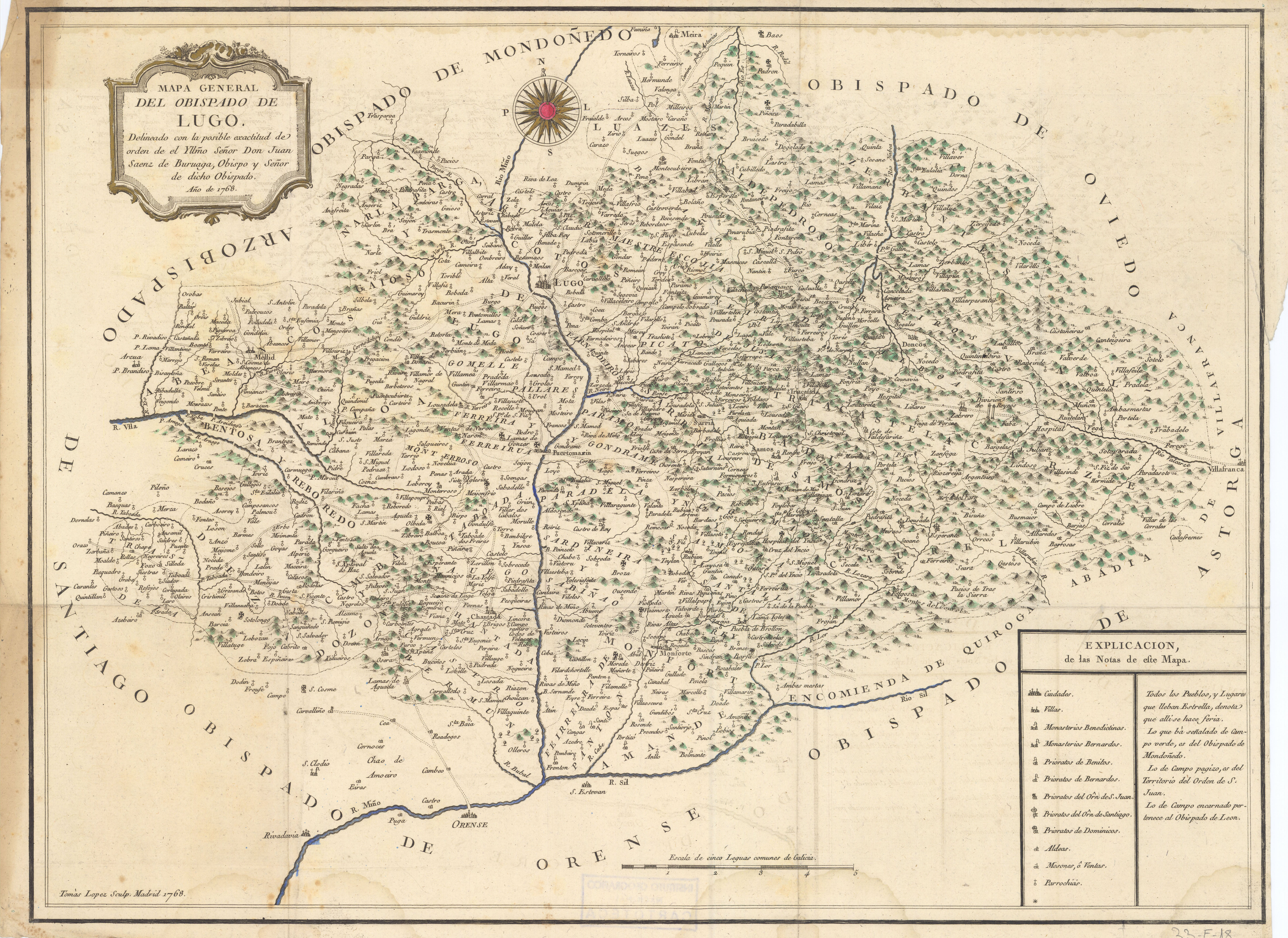 Mapa do bispado de Lugo.